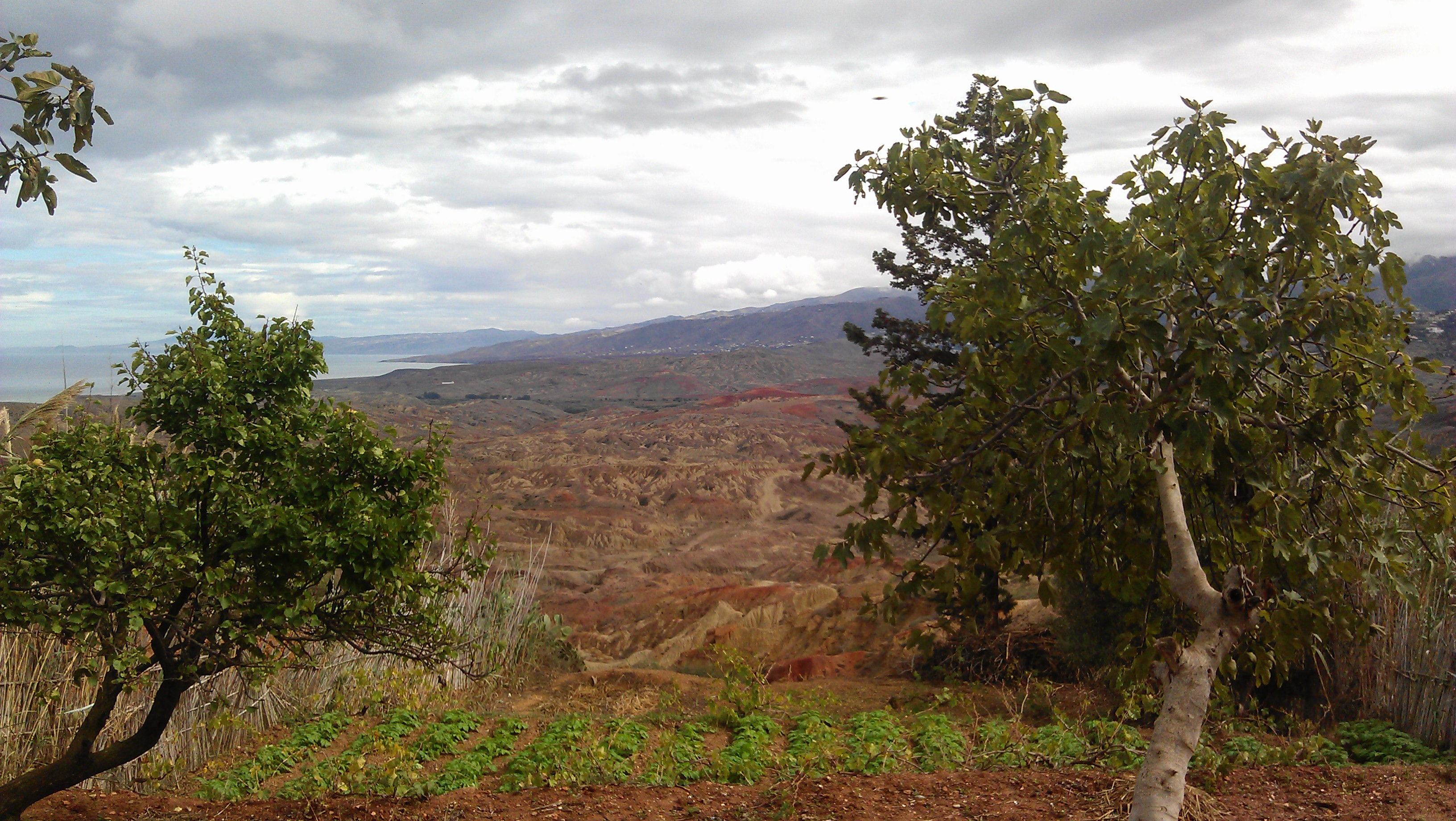 Figuier expose le paysage Rifain